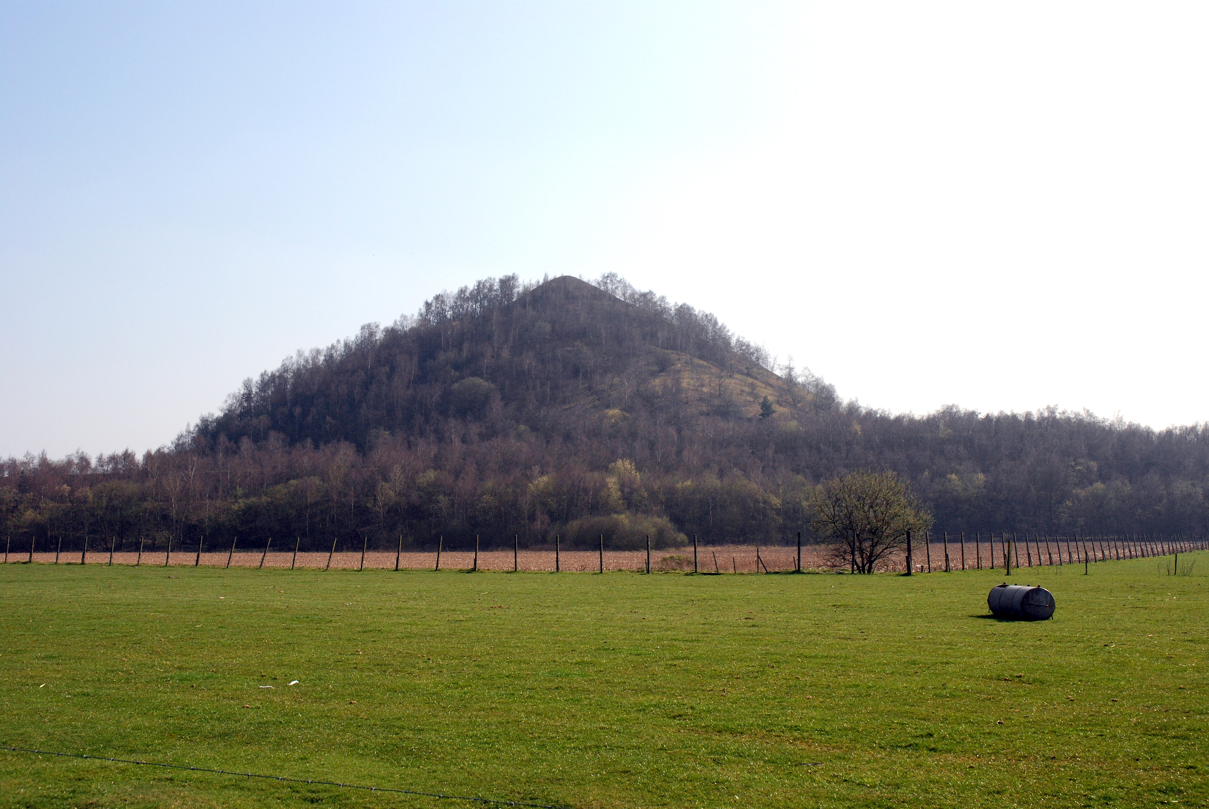 De terril of steenberg van de steenkoolmijn van Zwartberg, België